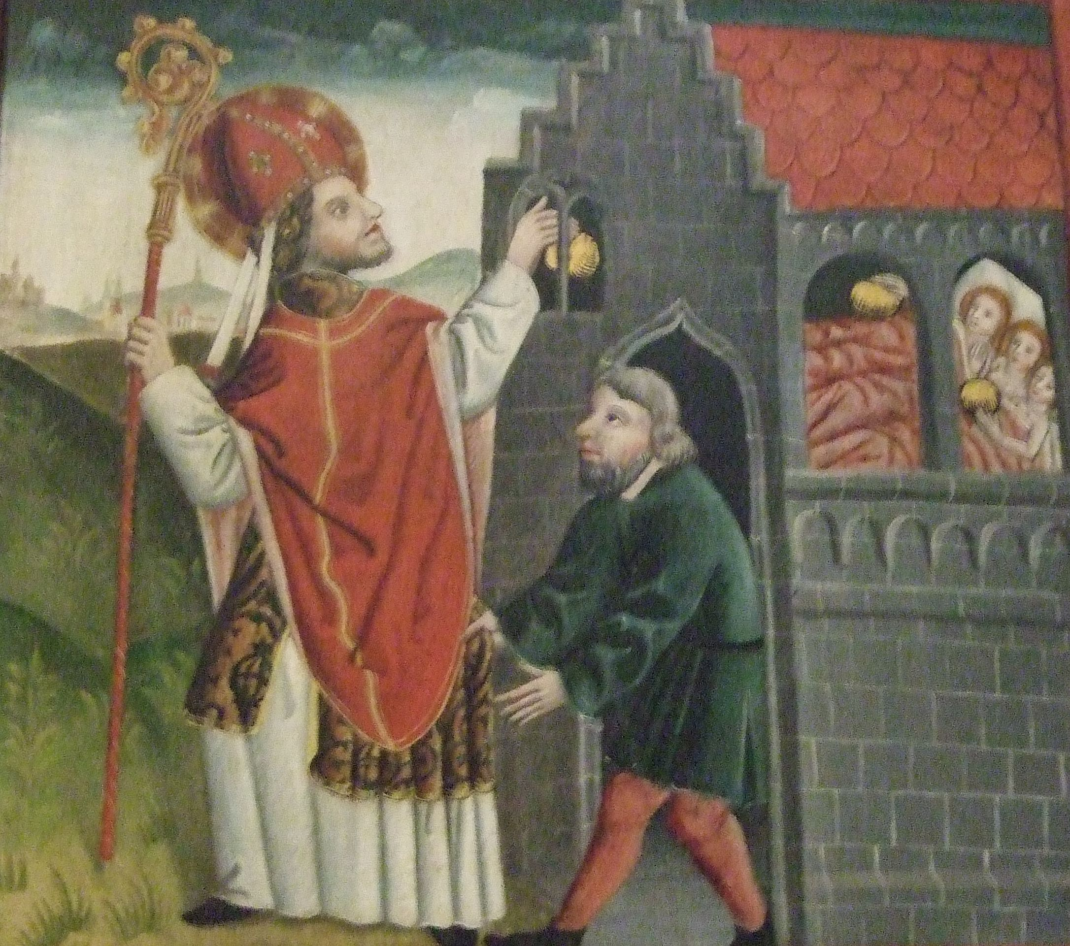 Bild einer Tafel von einem dem Nikolaus von Myra gewidmeten Altar. Es zeigt, wie der Heilige drei mittellose Jungfrauen mit Goldklumpen beschenkt, damit sie heiraten können. Der Vater bedankt sich bei ihm. Der Altar existiert nicht mehr, zwei Klapptafeln sind jedoch erhalten und hängen in der Kirche St. Mariae in Mühlhausen in Thüringen.